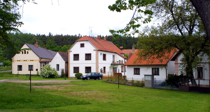 Čp. 8, 9 a 77 na severní straně návsi v Brodeslavech.